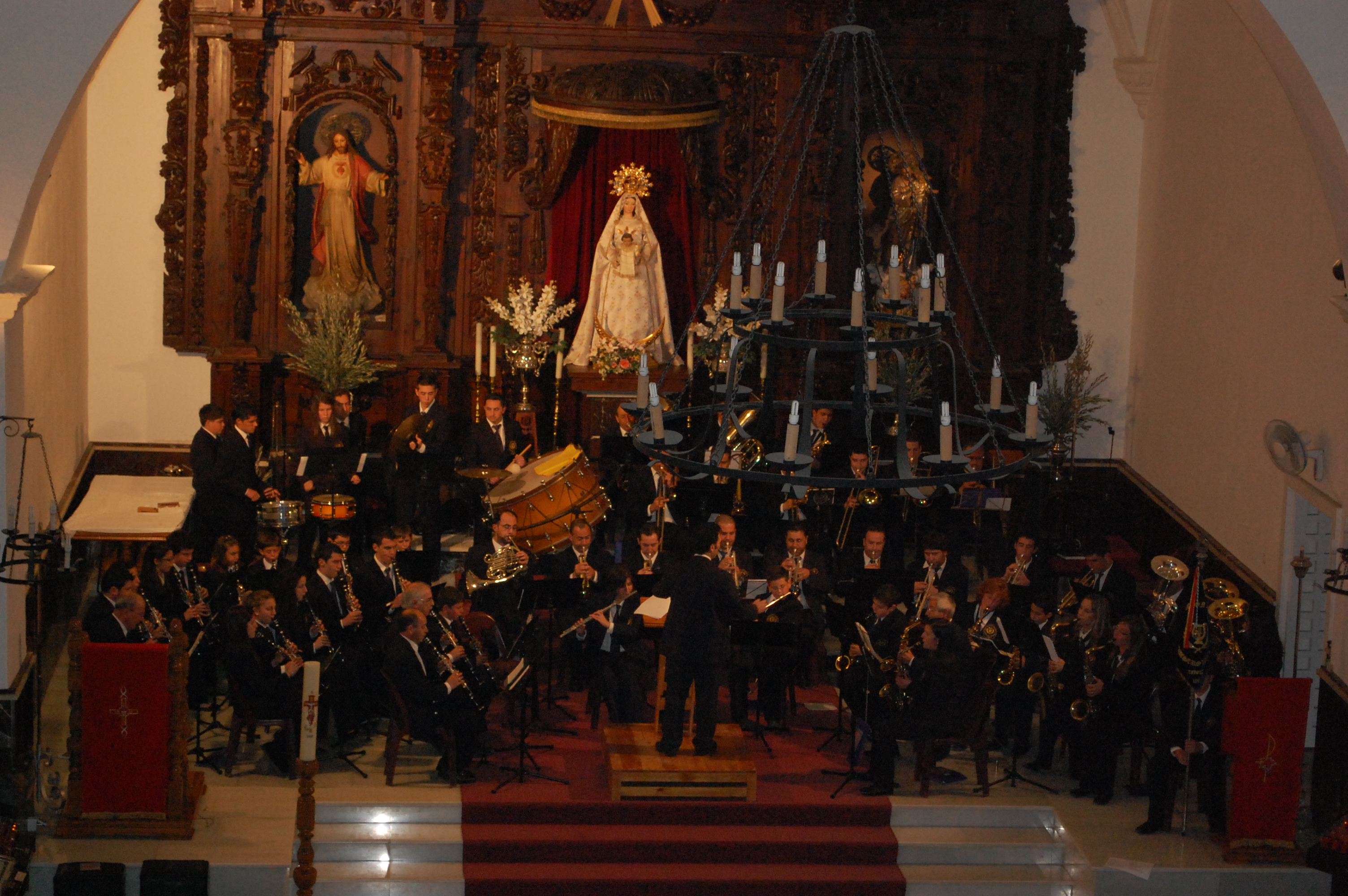 Concierto de la Banda de Musica de Tíjola, en la Iglesia Santa María de Tíjola.